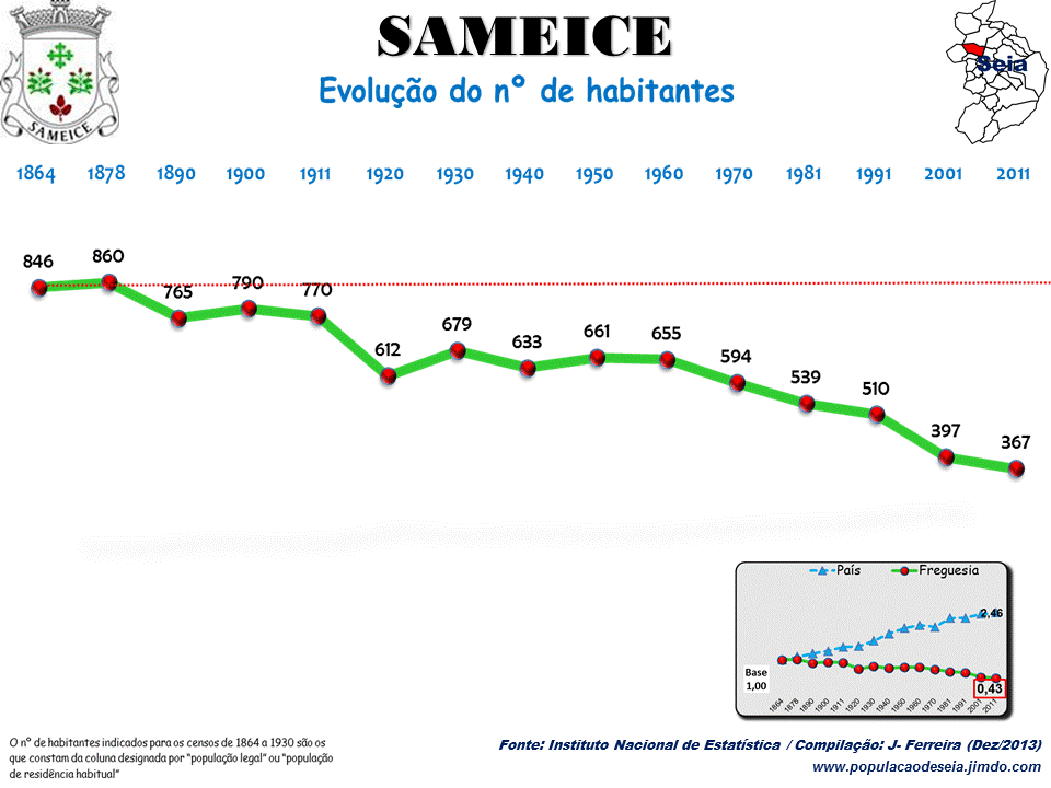 Evolução da População 1864 / 2011